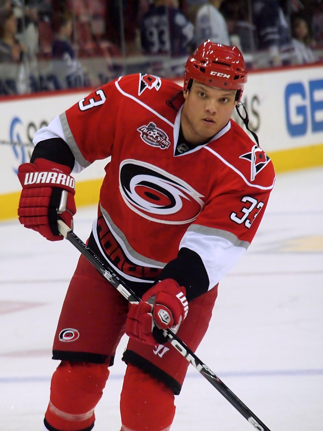 Derek Joslin